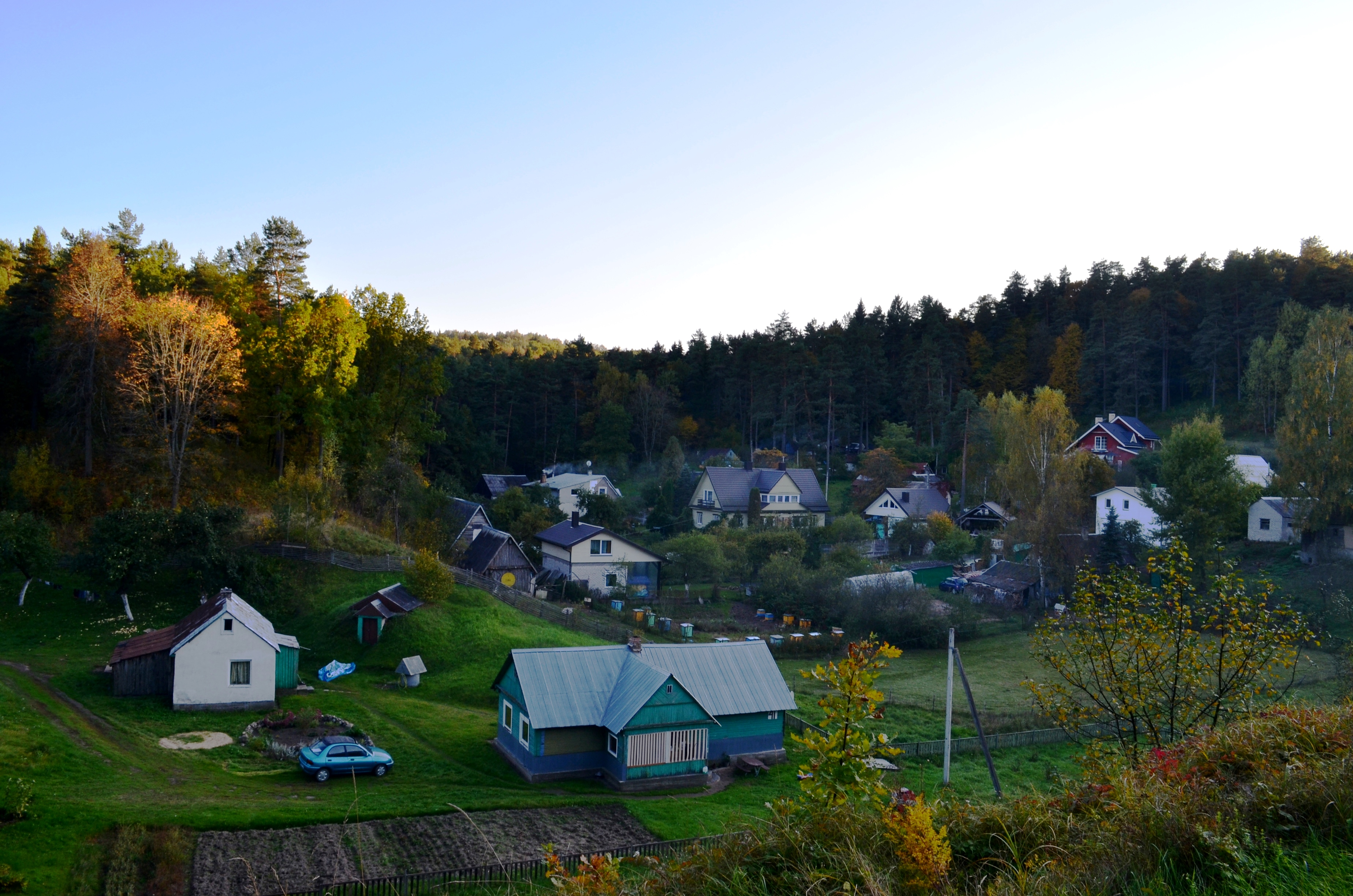 Voverių gatvė, Aukštieji Paneriai, Vilnius